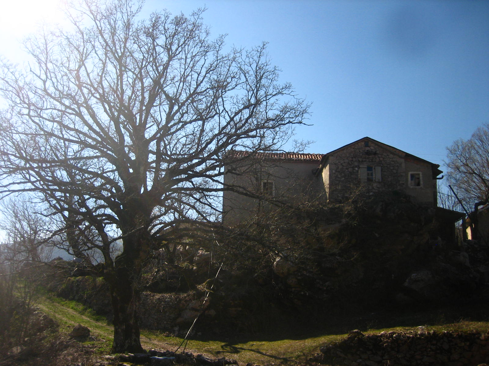 Kuća u Pačarađu.